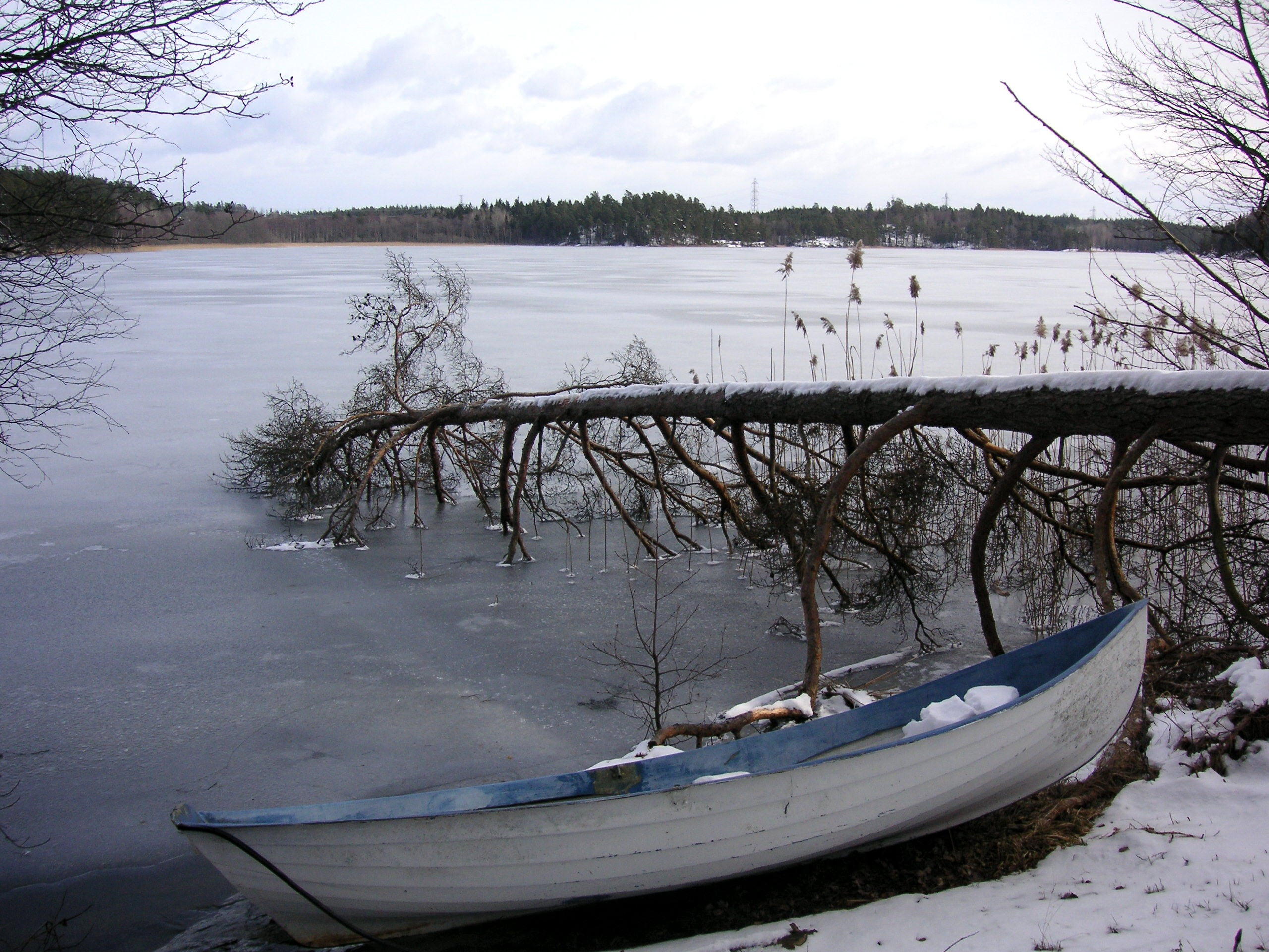 Sjön Tullan i Salems- och Södertäljes kommun